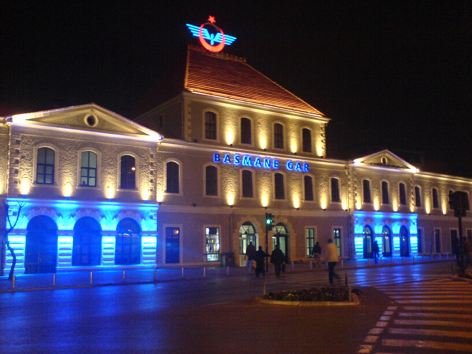 Basmane Gar, İzmir gece görünüş Night scene from Basmane Railway Station, İzmir, Turkey